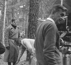 El director, David Lean y el protagonista, Omar Sharif, preparando una toma en el pinar de San Leonardo de Yagüe (foto: Teodoro de Miguel).